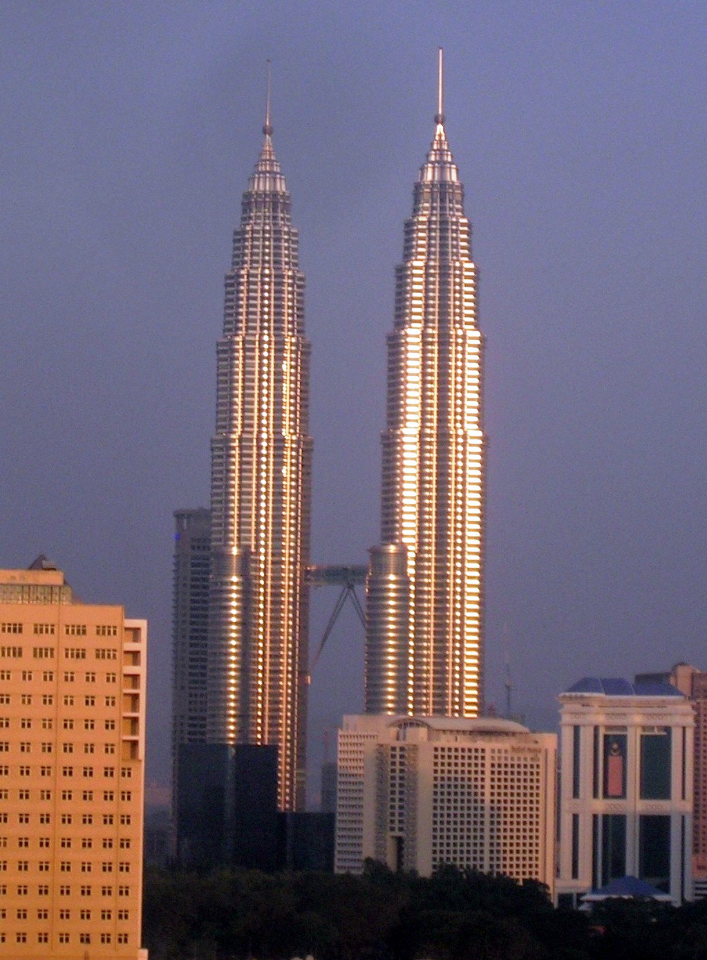 Petronas Towers in Kuala Lumpur, Malaysia at sunset